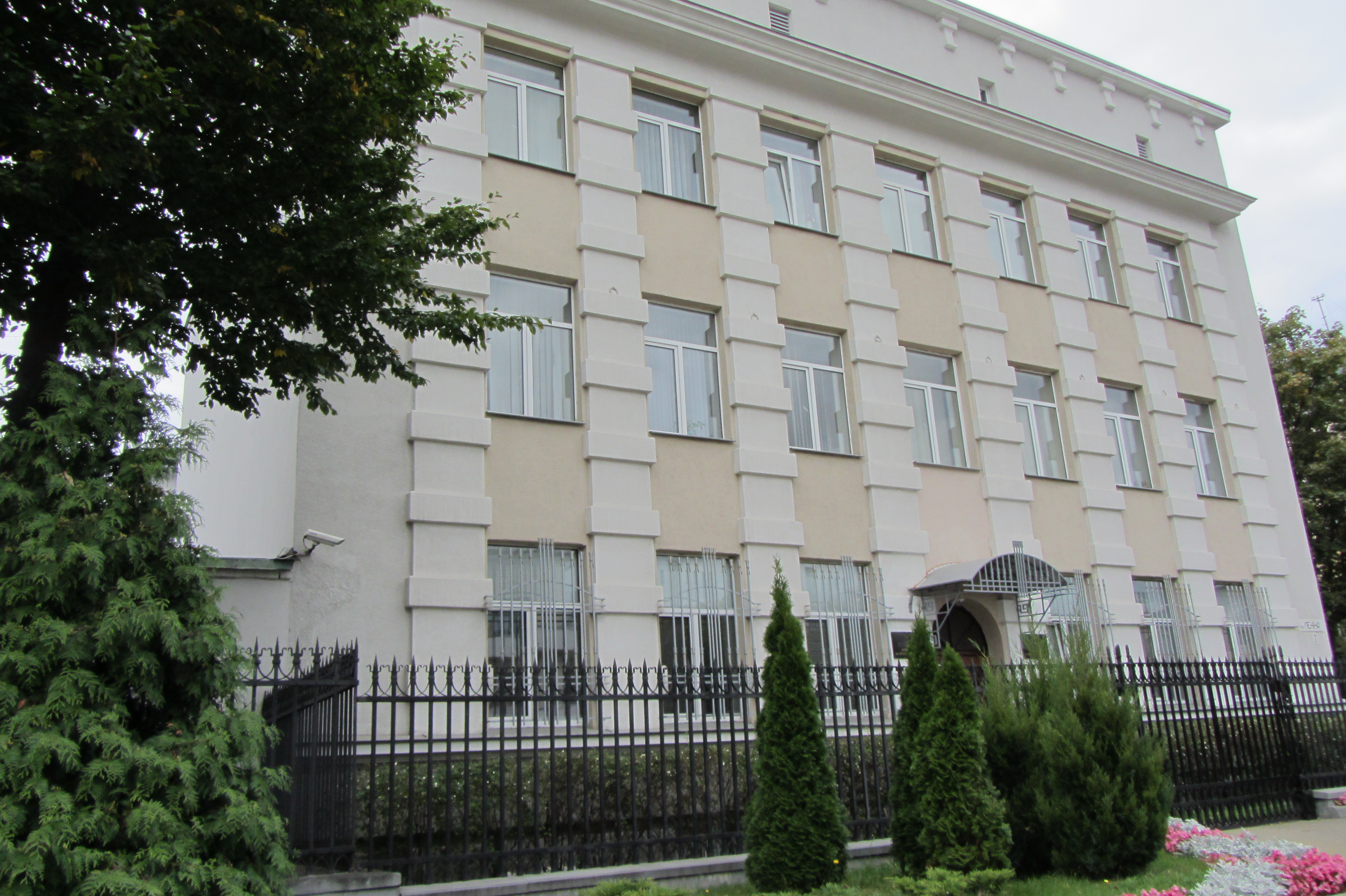 Беларуская (тарашкевіца): Забудова пл. Леніна. г. Берасьце This is a photo of Belarusian heritage monument. Reference number: 113Г000013 ( WLM)